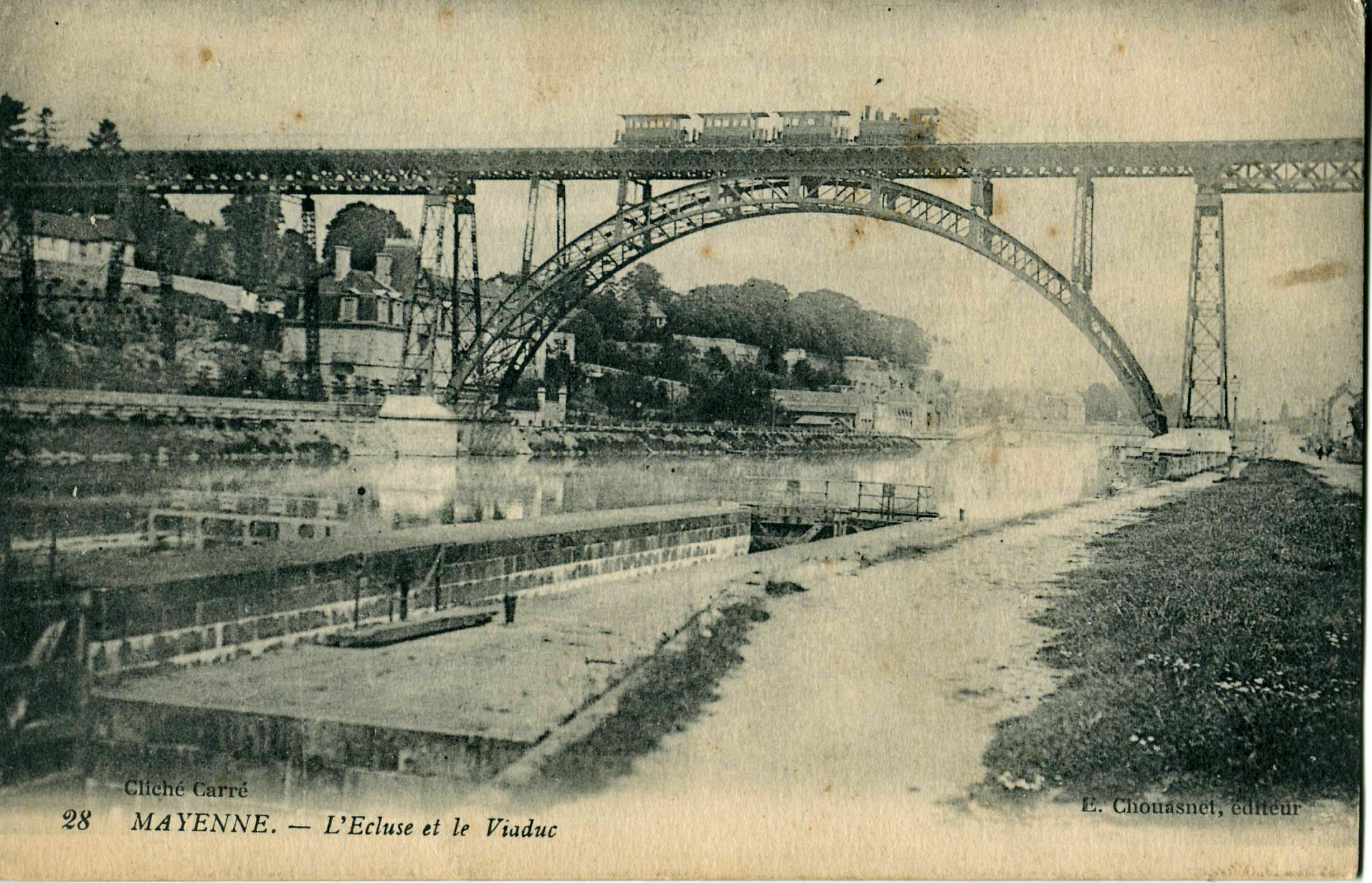 Carte postale ancienne éditée par Chouasnet, cliché Carré, n°27 : MAYENNE - L'écluse et le viaduc